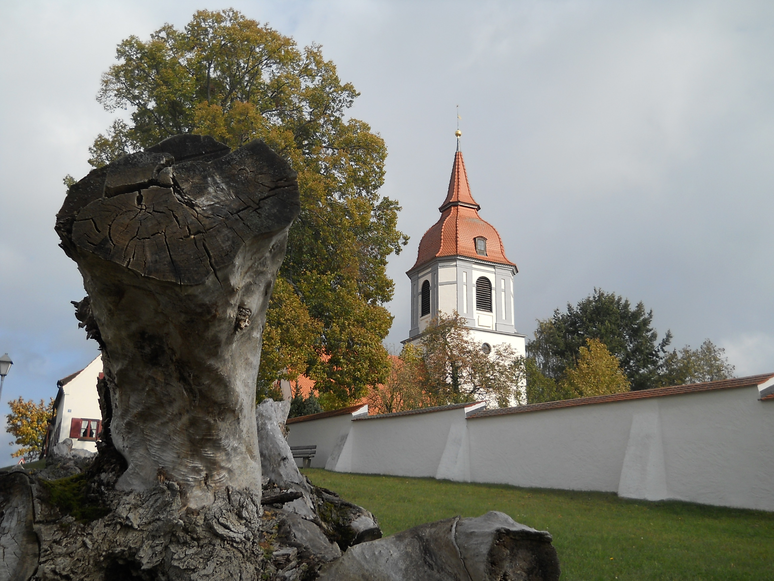 Unterasbach, Ortsteil von Gunzenhausen im mittelfränkischen Landkreis Weißenburg-Gunzenhausen (Bayern), St. Michaelskirche auf dem Michelsbuck